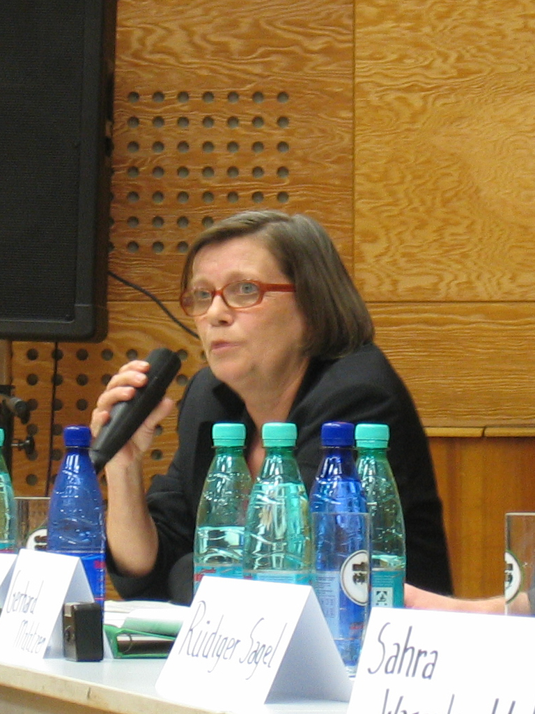 Die Politikerin Ursula Lötzer bei einer Diskussion in Köln